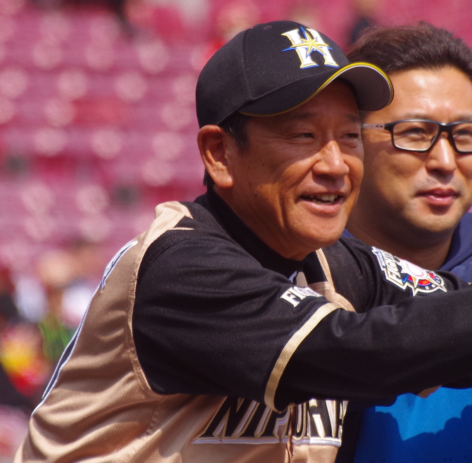 北海道日本ハムファイターズ監督栗山英樹